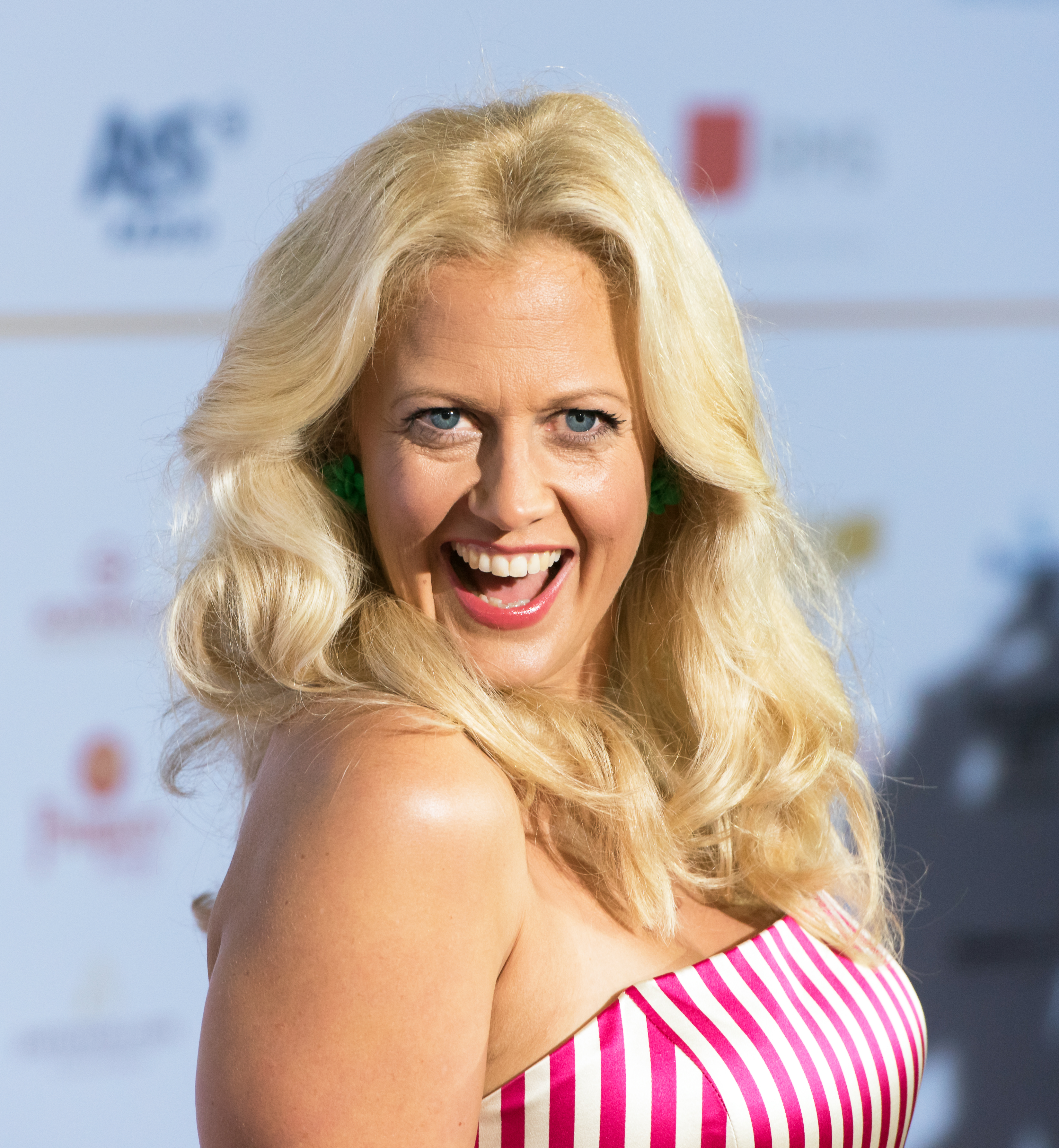 Barbara Schöneberger beim Deutschen Radiopreis 2016 im Schuppen 62 in Hamburg